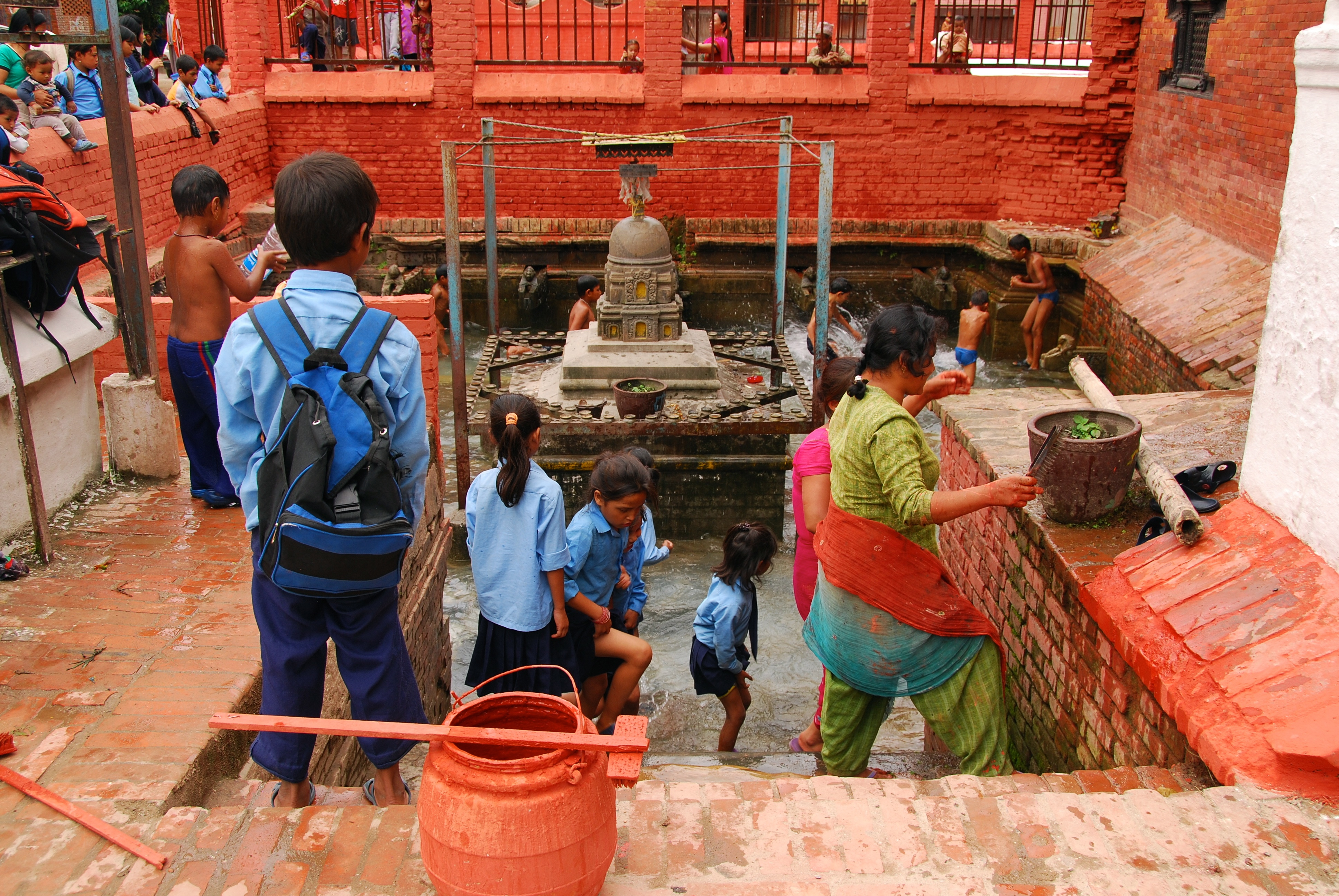 Misha Hiti Kumbeshwar, Patan.